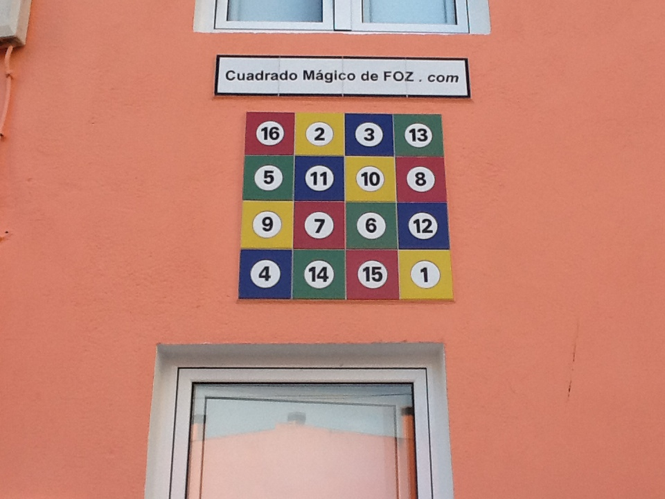 Cuadrado Mágico de FOZ